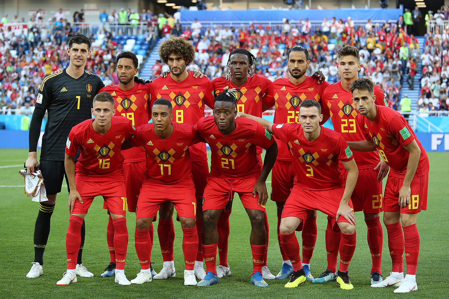 Второй состав сборной Бельгии оказался сильнее резерва англичан на ЧМ-2018